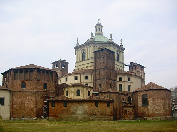 Basilica di San Lorenzo a Milano. Picture taken by user:Idéfix, 21 jan 2006